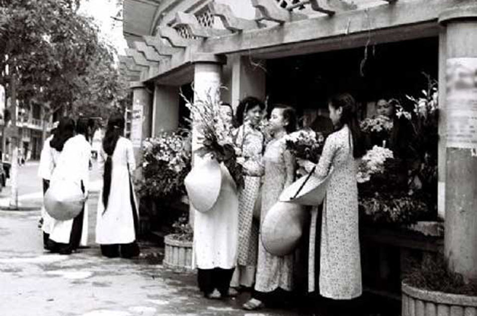 Hàng hoa Tết Nguyên-đán, Hà-nội thập-niên 1950.